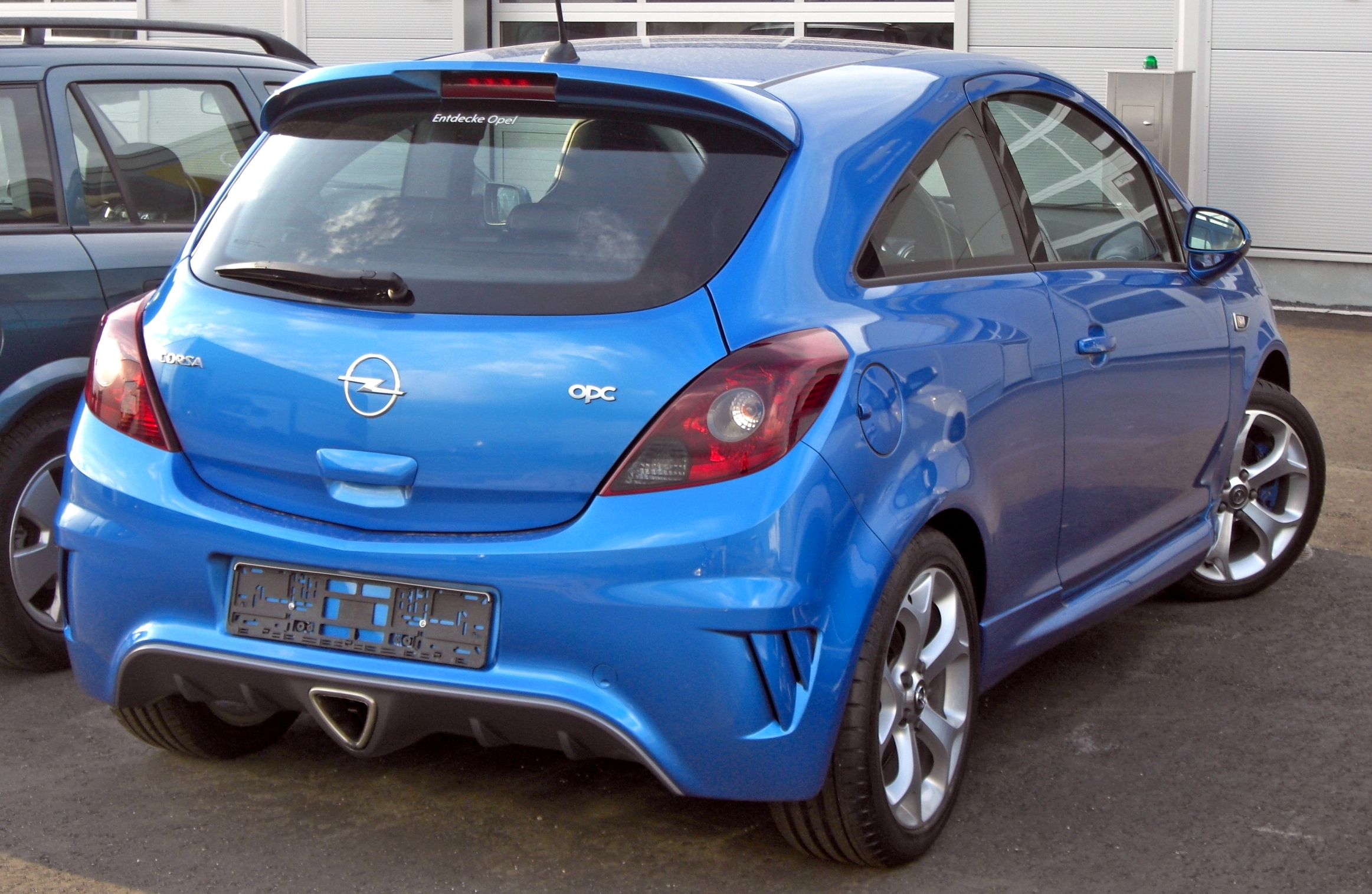 Opel Corsa D OPC